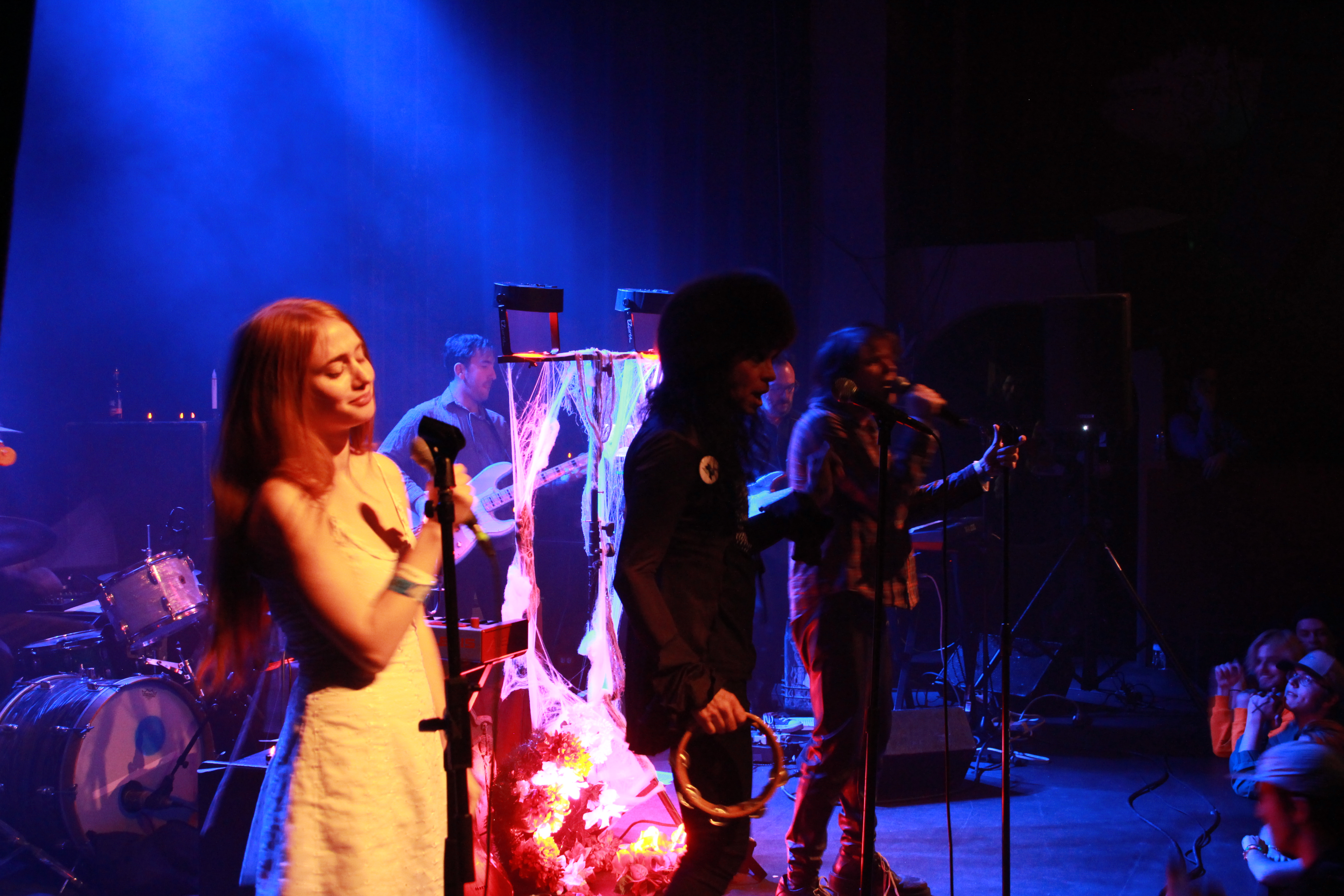 Ariel Pink ::: Bluebird Theater ::: 10.24.17